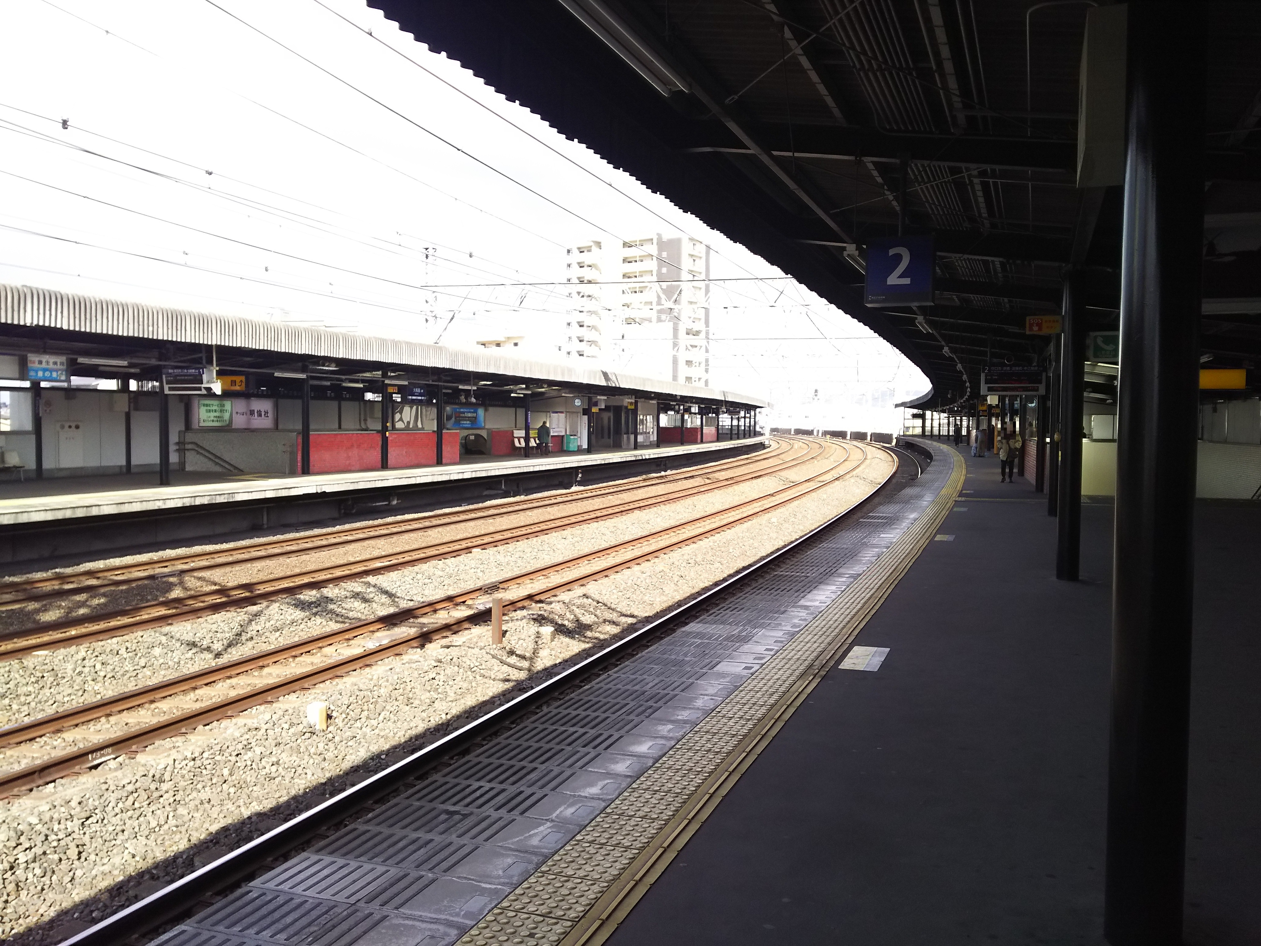 京阪本線大和田駅プラットホーム（大阪府門真市）